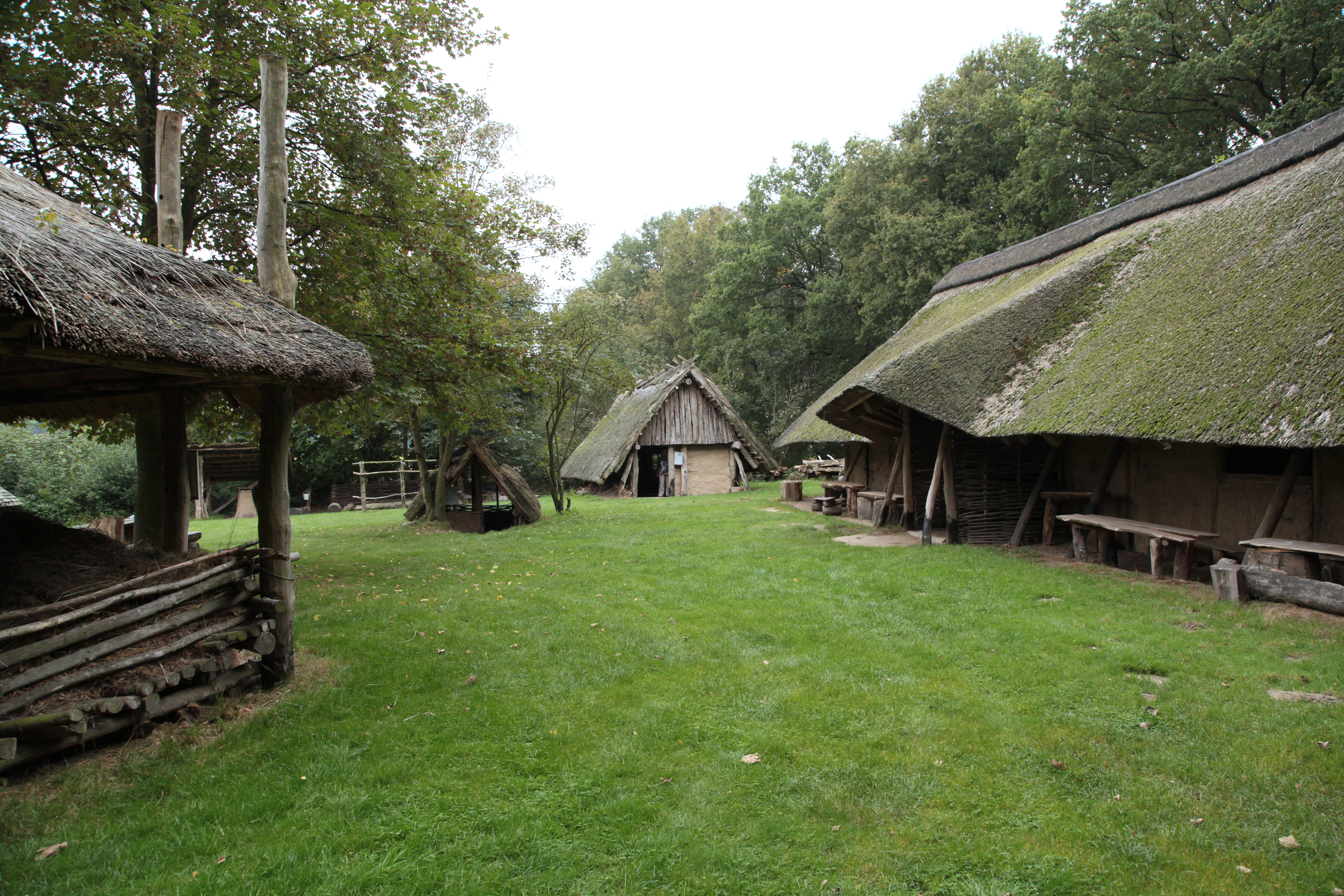 Sachsenhof, Pentruper Mersch in Greven